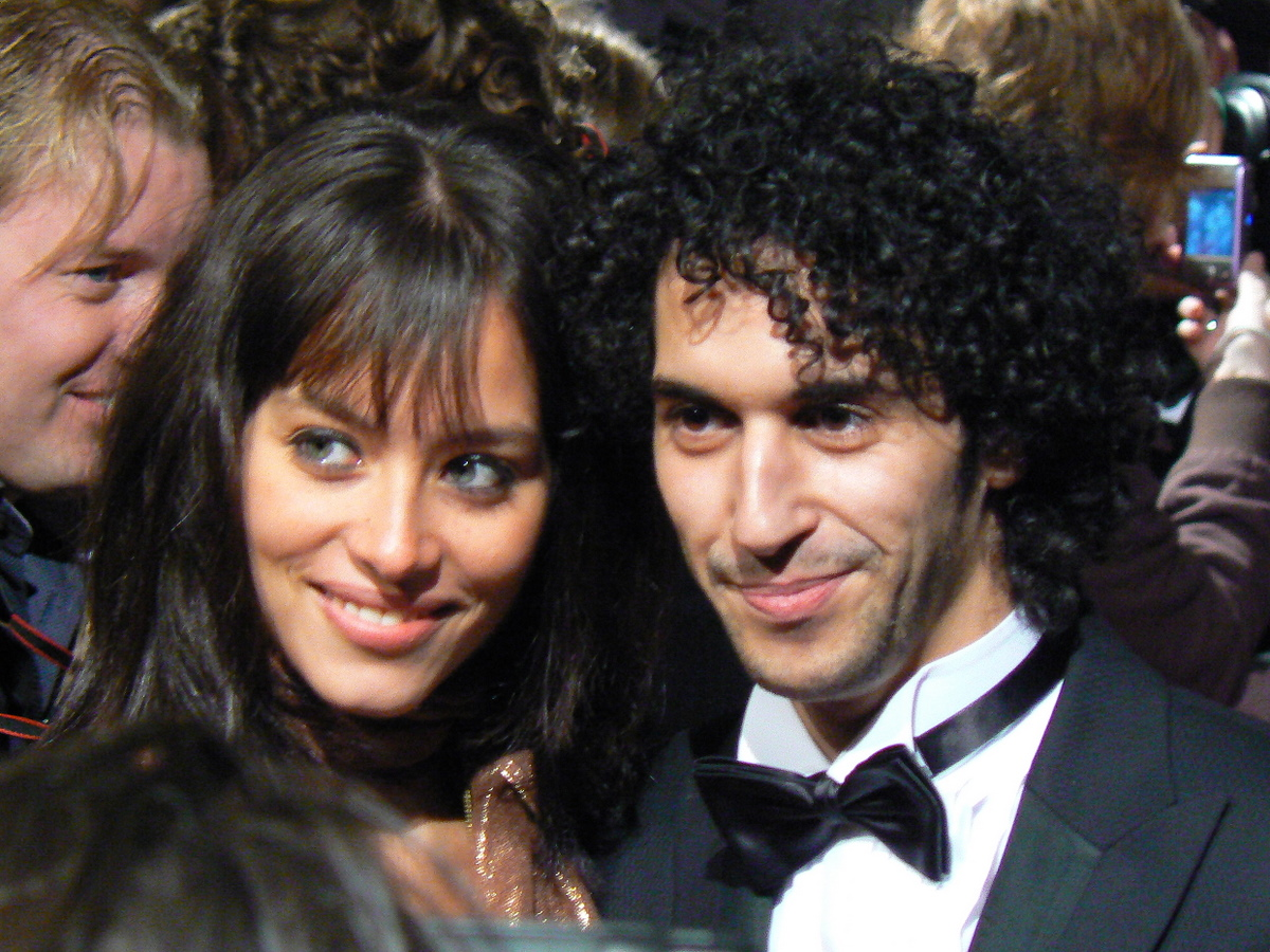 Dit zijn Achmed Akkabi en zijn vriendin Liliana de Vries tijdens de première van de Nederlandse film 'Alibi' bij de bioscoop Pathé Tuschinski in Amsterdam op 11 februari 2008.